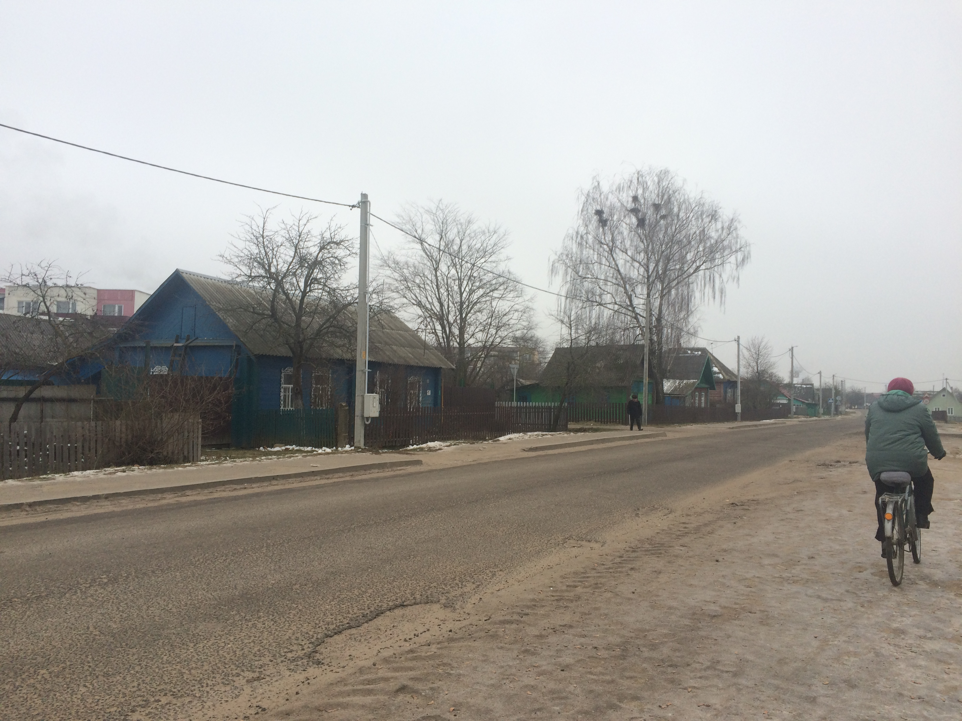 Беларуская (тарашкевіца): Дуброўна (Беларусь) — вуліца Горацкая